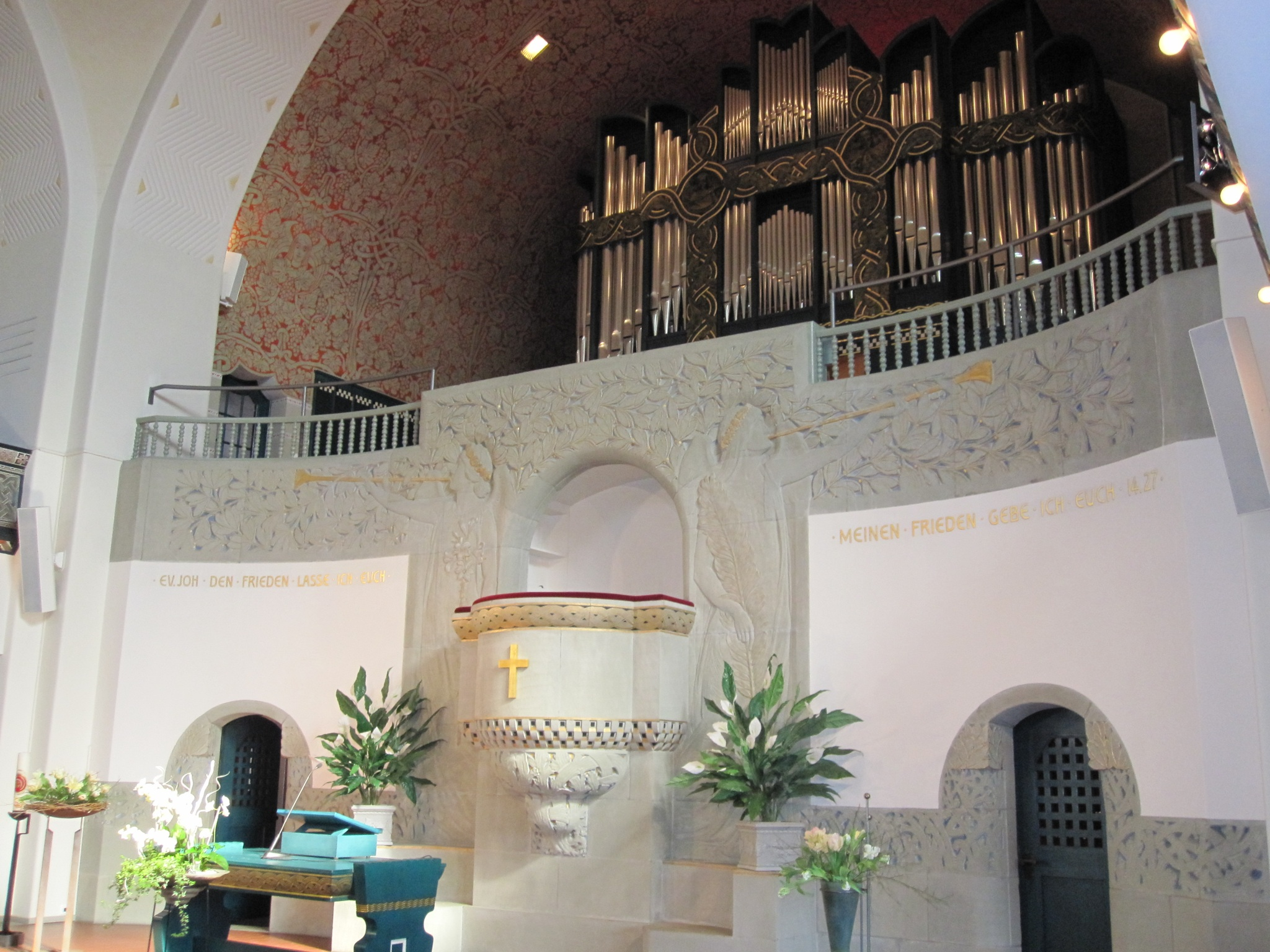 Evangelische Kirche in Weinfelden, im Inneren Blick auf die Kanzelwand